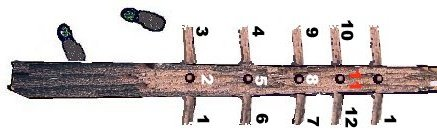 Grafisk framstilling av kvistesystemet